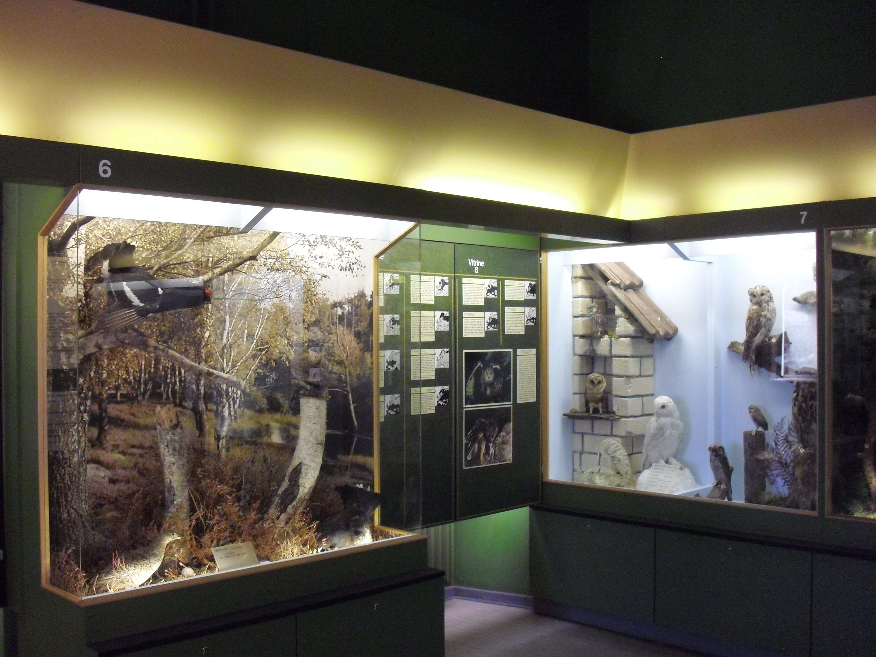 Einige Vitrinen aus dem Naturkundlichen Museum (Schweinfurt)